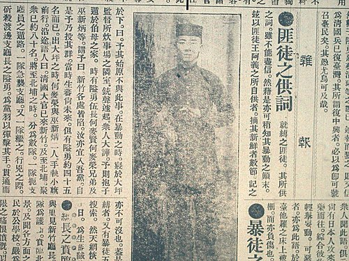 《漢文臺灣日日新報》關於北埔事件的新聞報導；圖片所示者應為蔡清琳。